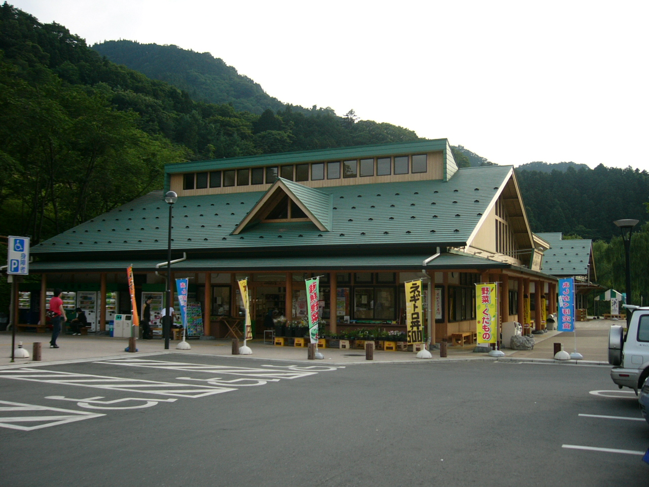 Michinoeki Kajukoen Ashigakubo (Saitama) (道の駅果樹公園 あしがくぼ)